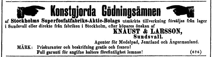 Annons i Sundsvalls tidning för firman Knaust & Larsson